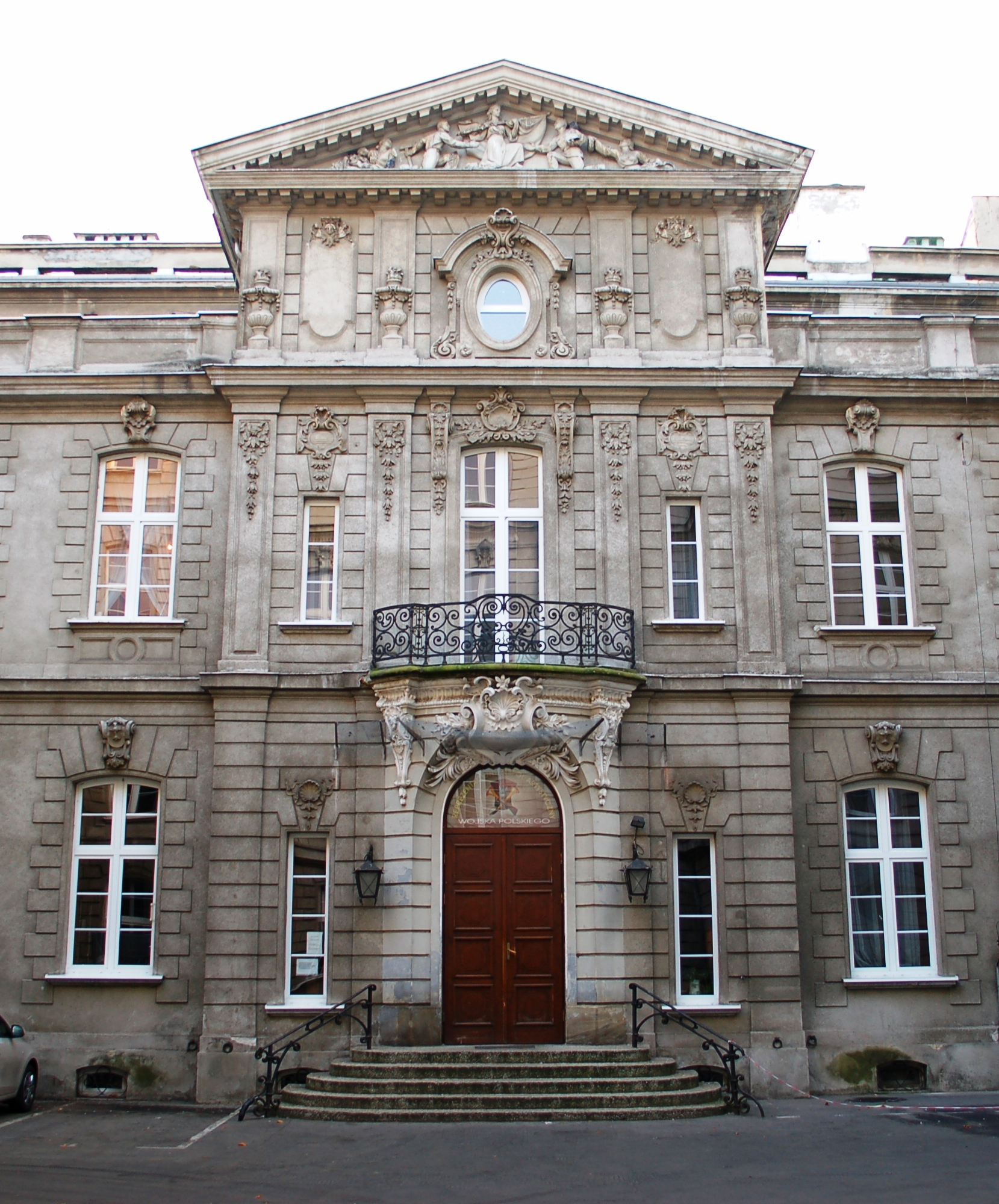 Palast der Warschauer Jägergesellschaft, Ulica Kredytowa, Warszawa